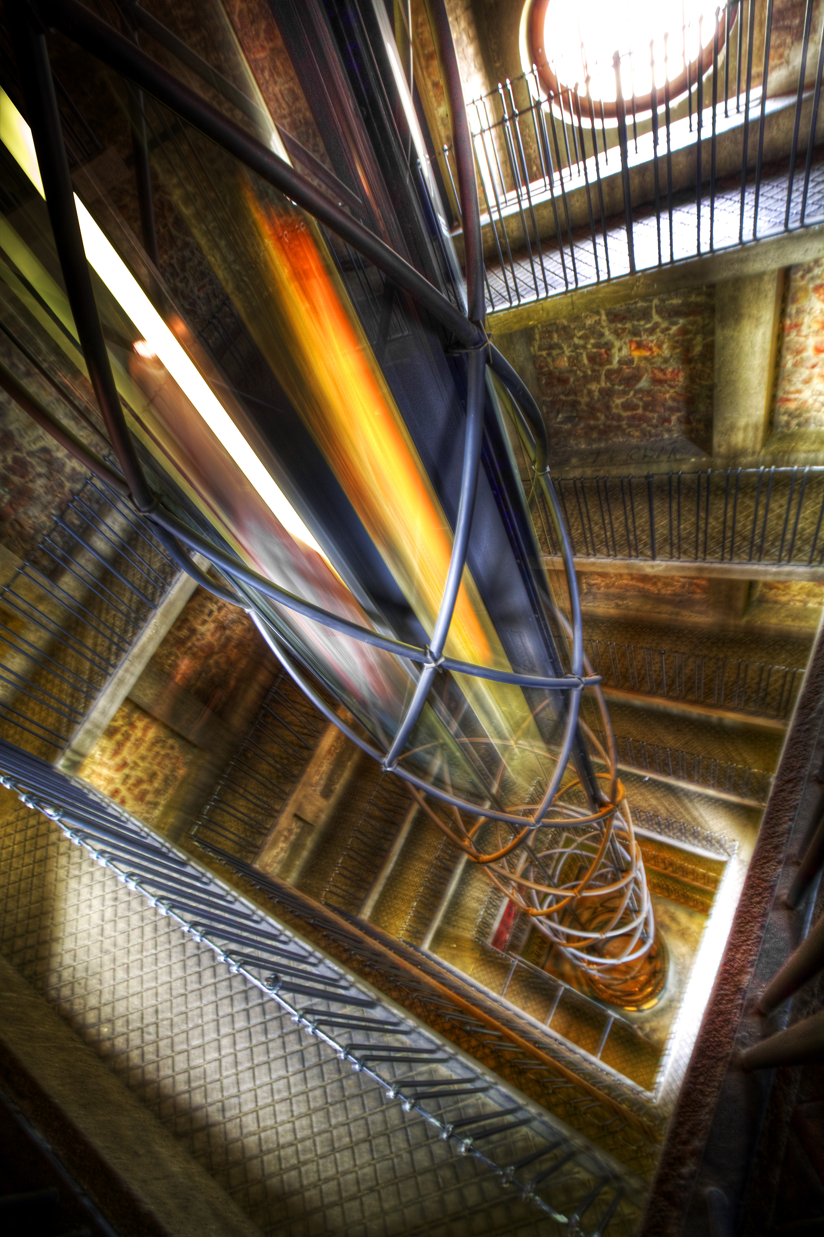 Radnice Staroměstská (Staré Město), Praha 1, Staroměstské nám. 1/3, Staré Město